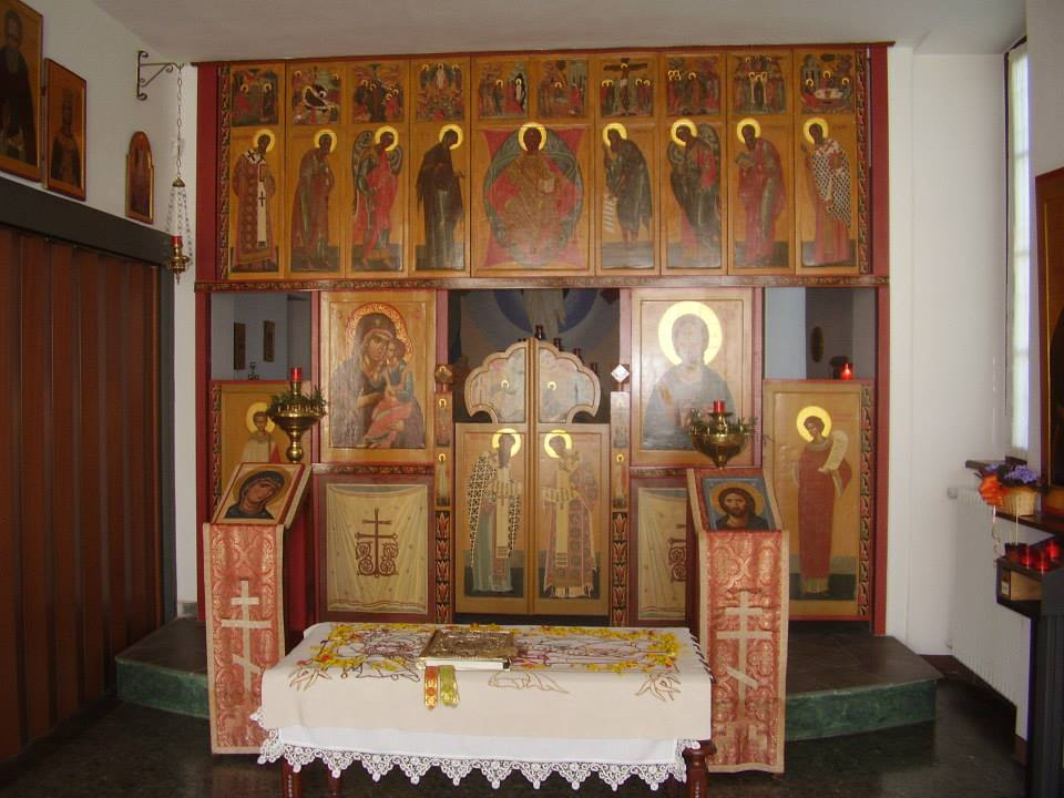 Иконостас домового Преображенского храма в центре Христианская Россия на вилле Амбивери в Сериате. Работа А. Овчинникова стилизация в Псковском стиле